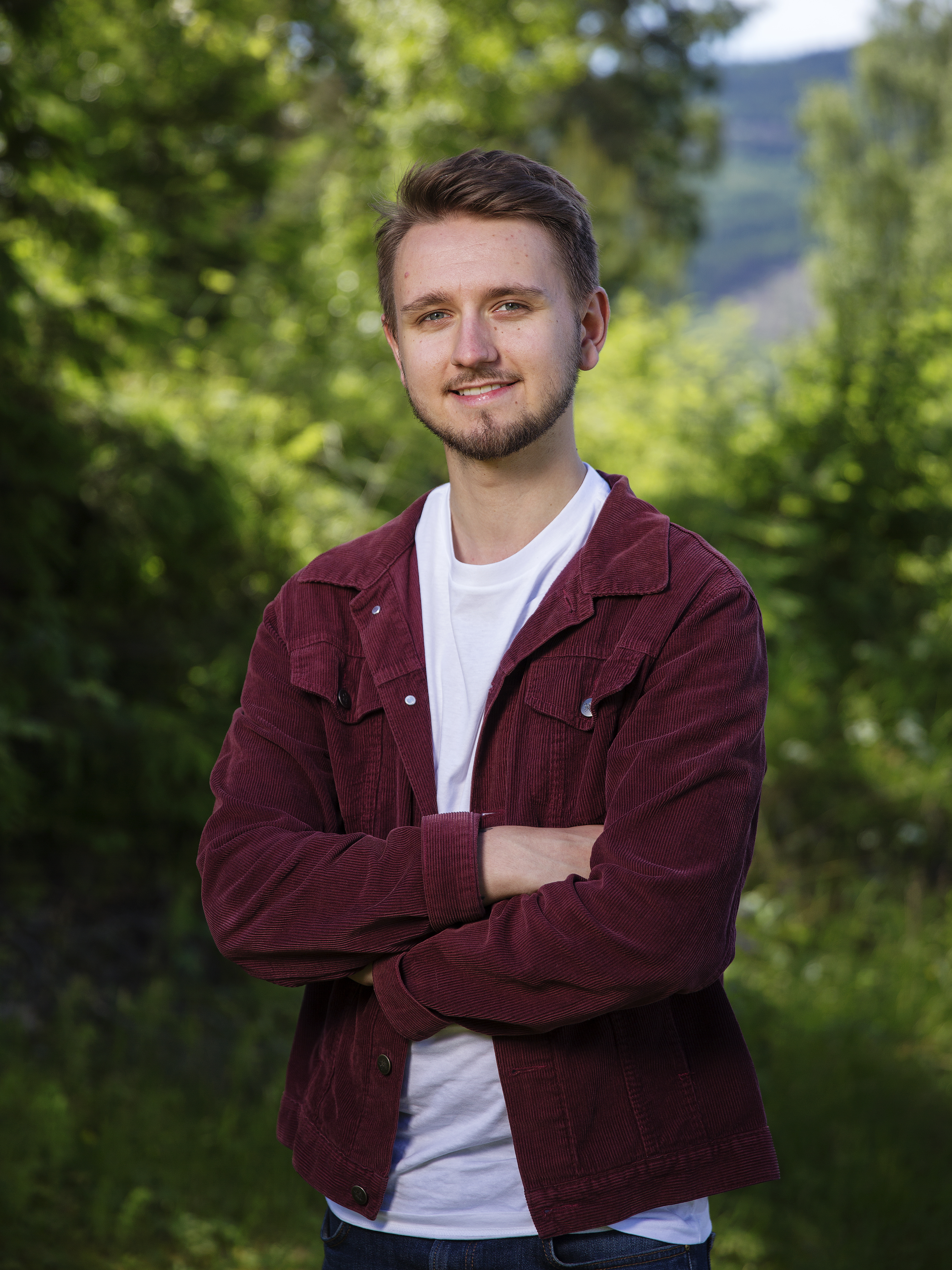 Freddy Øvstegård